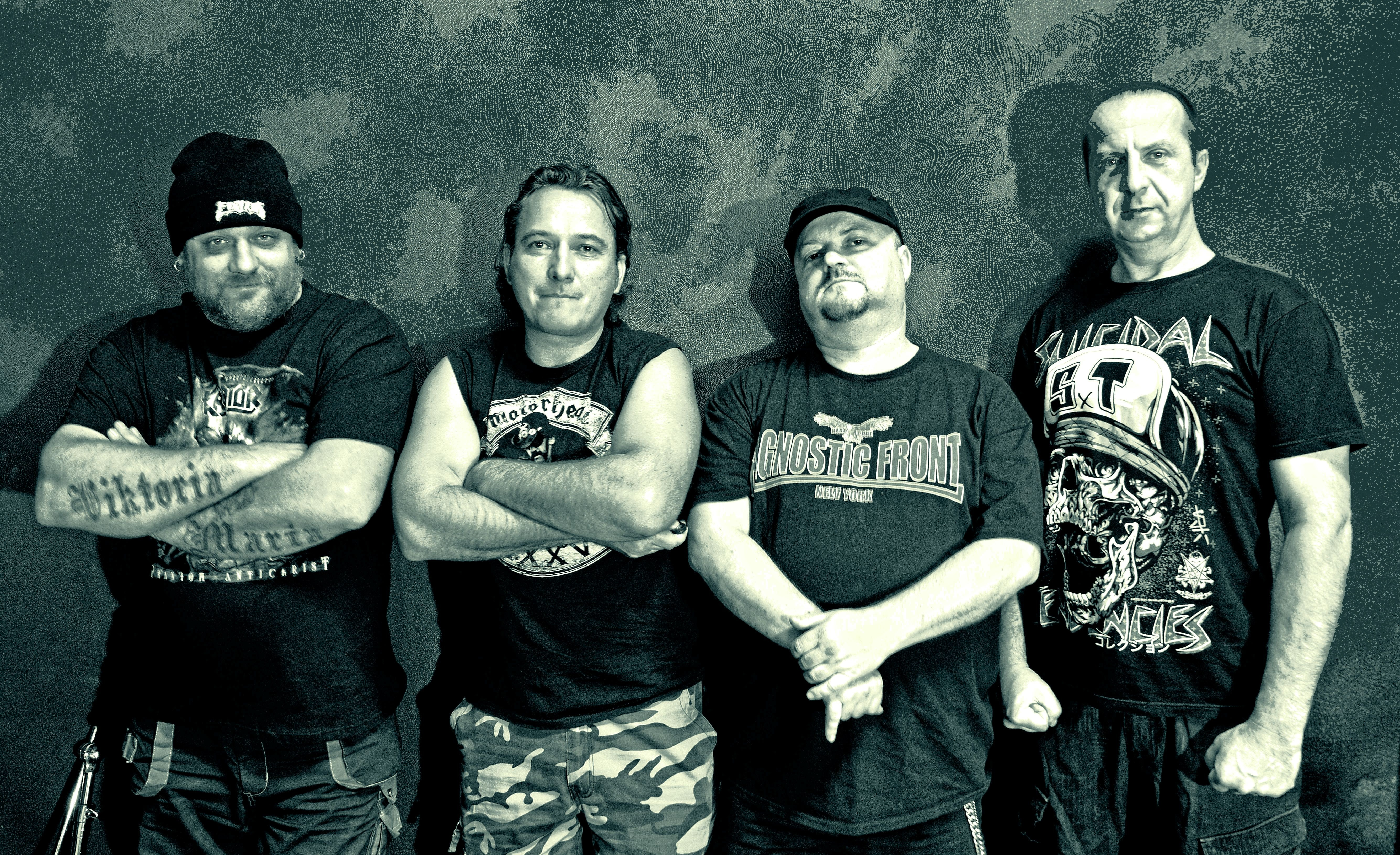 foto skupiny EDITOR